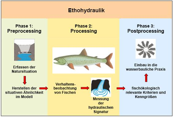 Ethohydraulik _ Schema Versuchsablauf